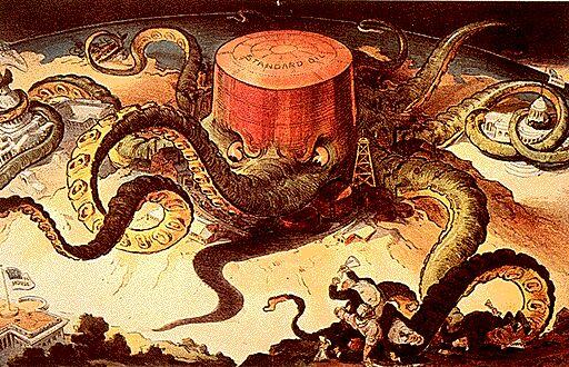 Dessin de presse